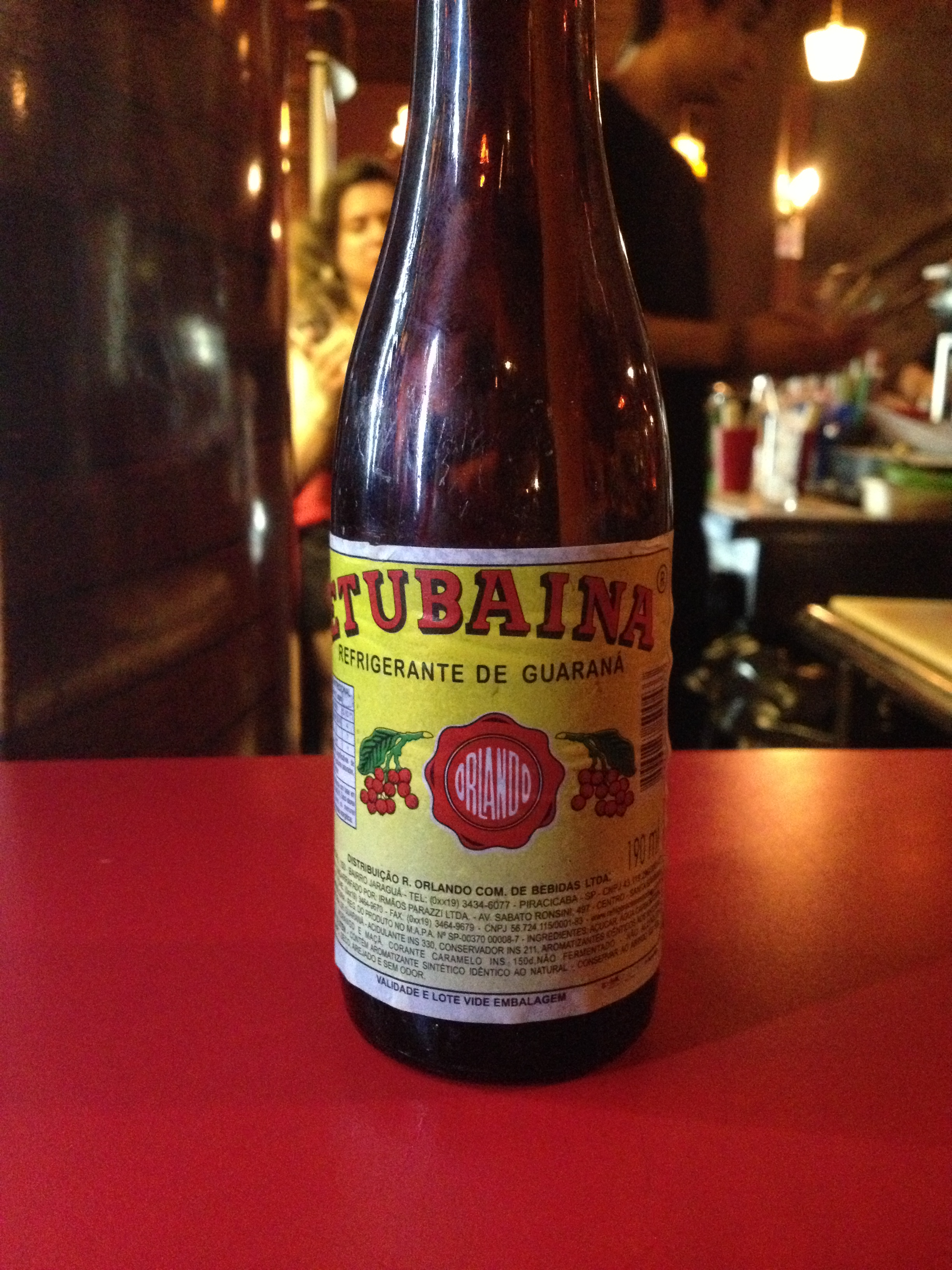 Marca Etubaína no balcão do bar Tubaína.